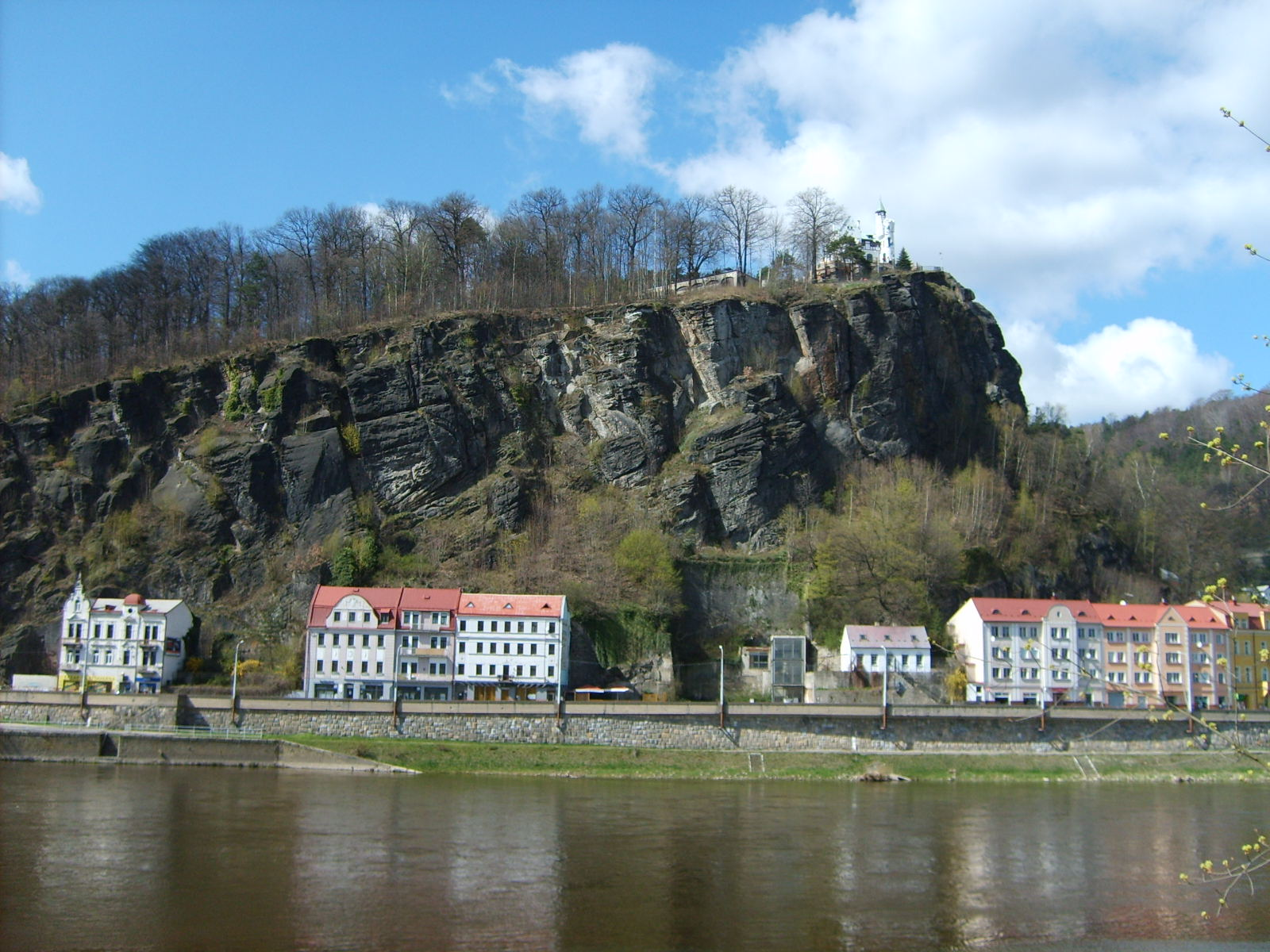 Vyhlídková restaurace na Pastýřské stěně v Děčíne, pohled od Labe